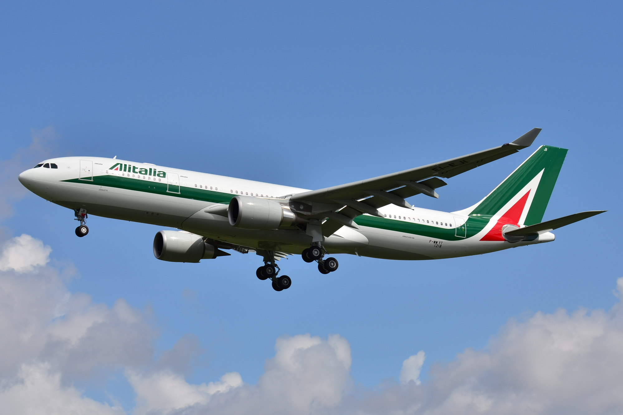 Photo prise à l'aéroport de Toulouse-Blagnac (LFBO) en France. Picture take at Toulouse-Blagnac Airport (LFBO) in France.